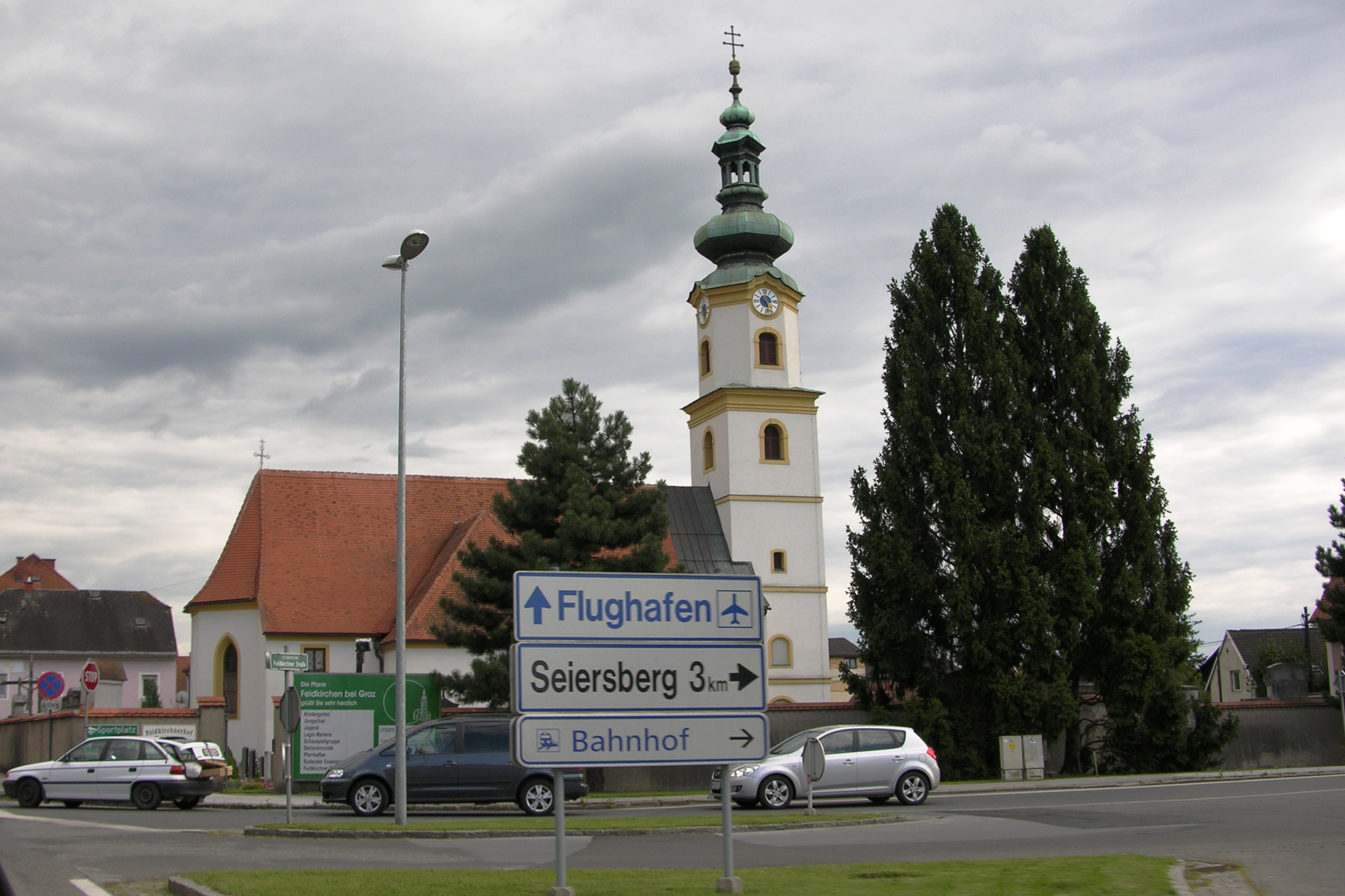 Ortseinfahrt von Feldkirchen mit Pfarrkirche